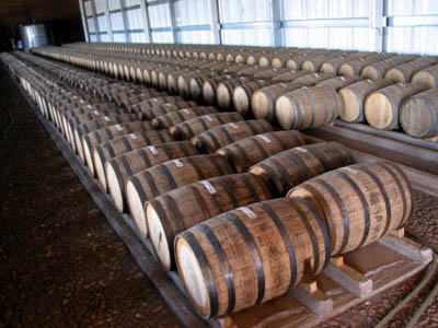 Barricas de roble añejando Tequila